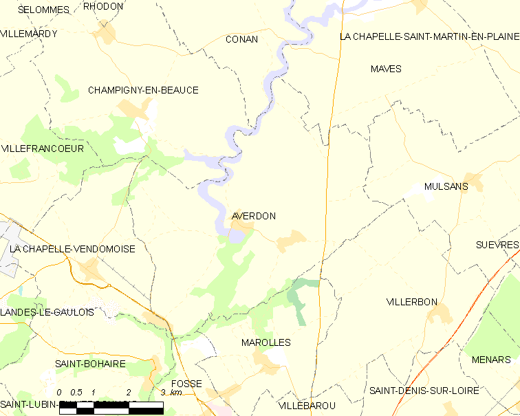 Carte des communes de France, centrée sur Averdon (Loir-et-Cher, code Insee 41009)